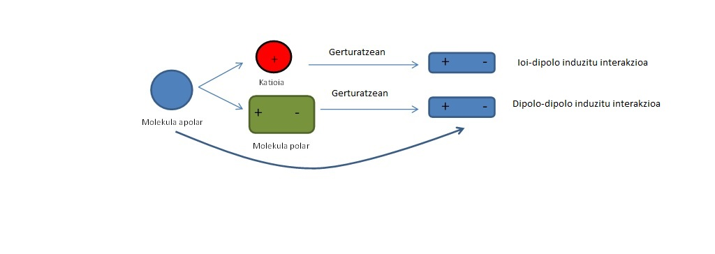 Dipolo-dipolo induzitu